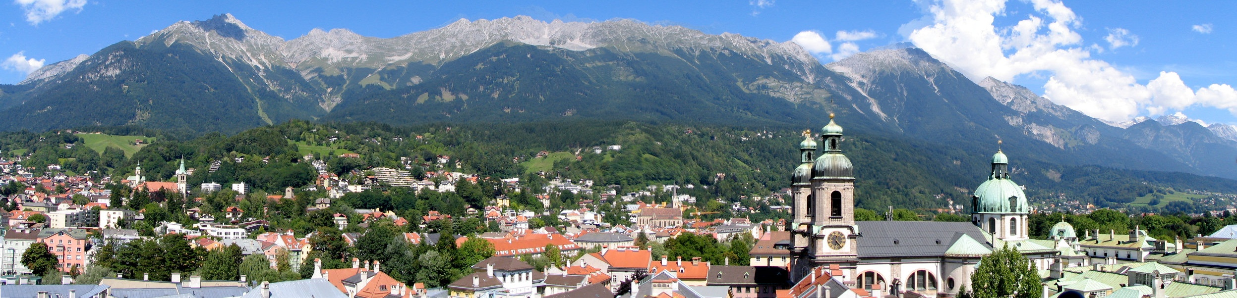 Panorama Innsbruck Austria vom Rathaus Turm